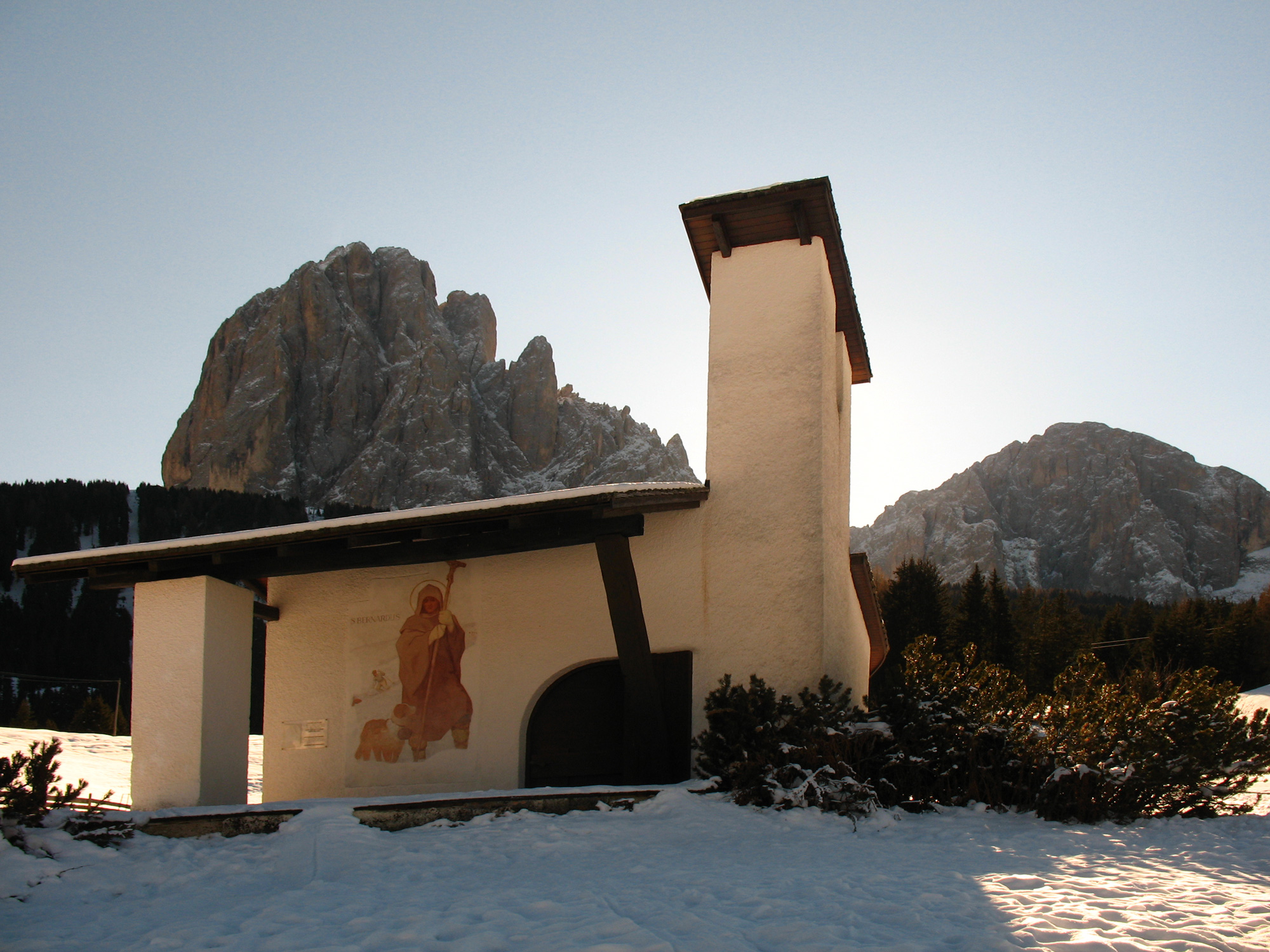 Bergkapelle des Architekten Franz Baumann auf Monte Pana - St. Christina in Gröden.